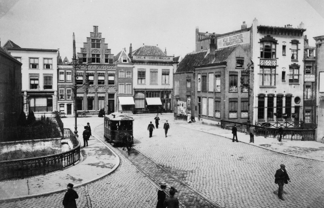 Dordrecht, gezicht vanaf Visburg naar Groenmarkt, omstreeks 1910.